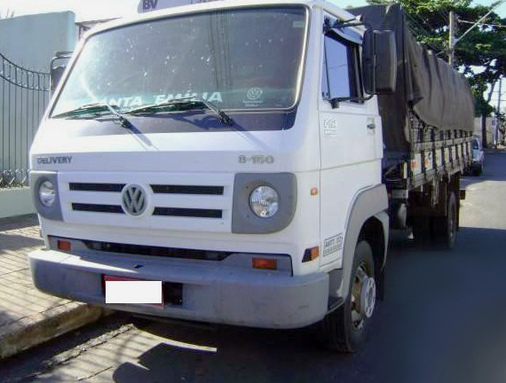 2006 Volkswagen 8-150 Delivery diesel, a Brazilian-built truck